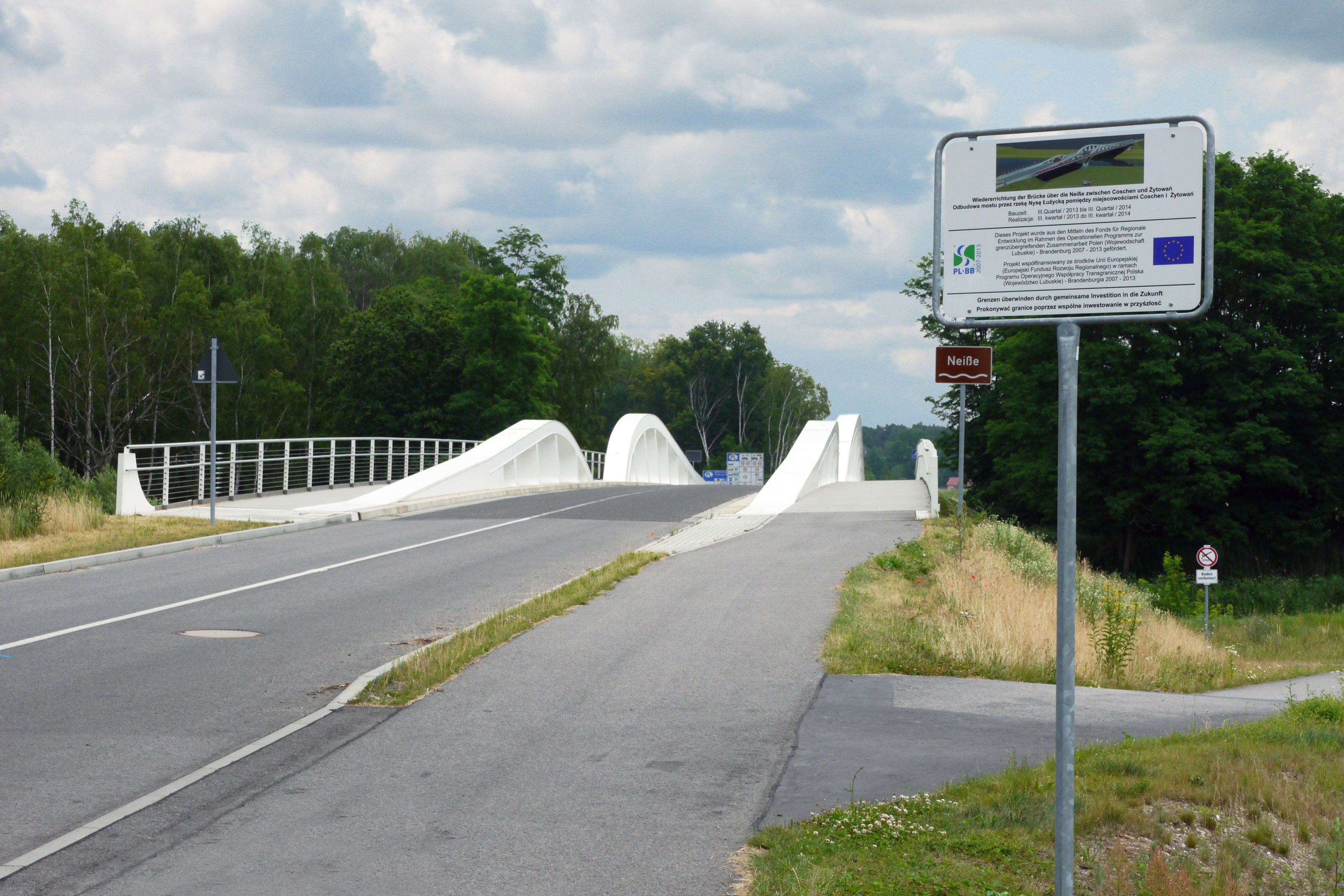 Neiße-Brücke "Neißewelle" zwischen Coschen und Żytowań